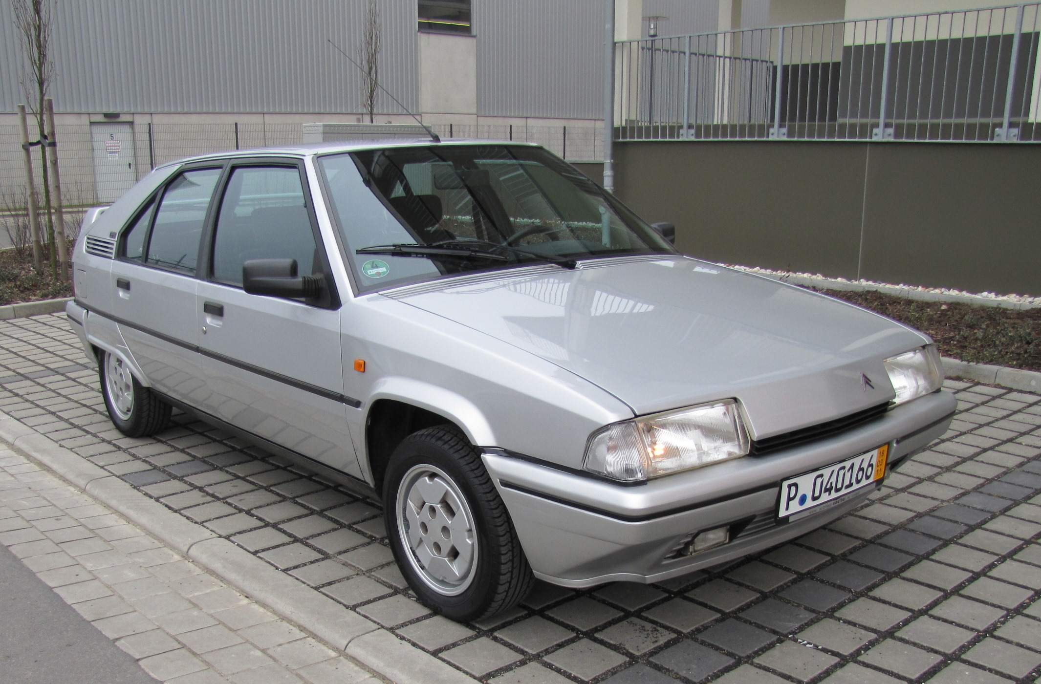 Citroen BX 19 GTi, Baujahr 1990